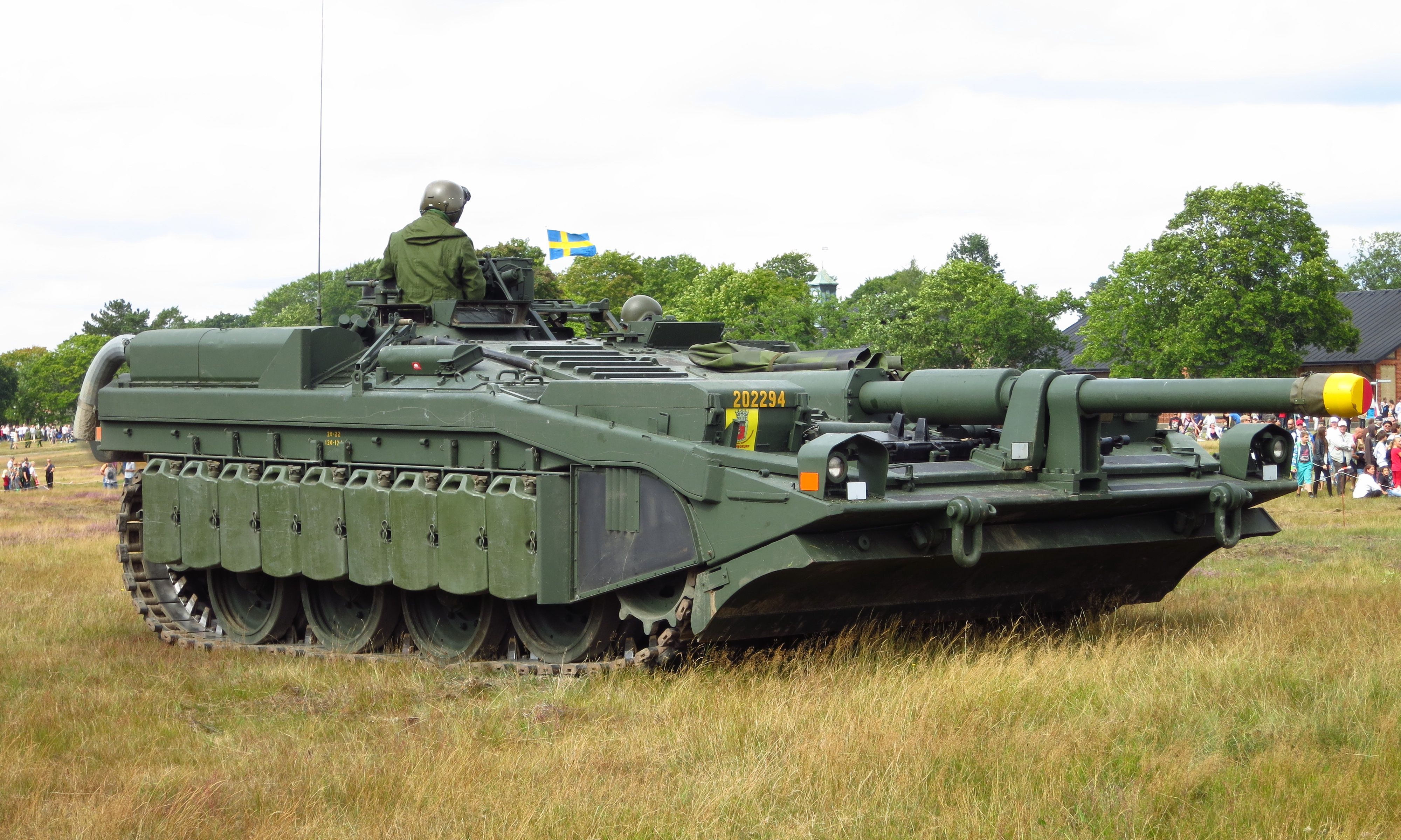 Stridsvagn 103 (Stridsvagn S) vid Regementets Dag på P7 Revingehed